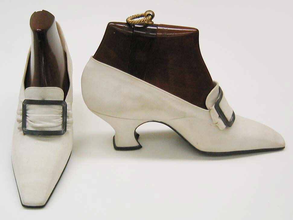 French; Pumps